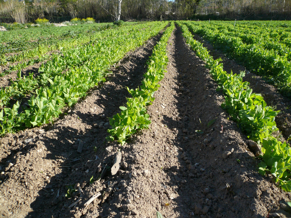 Champ de petit pois (culture maraîchère) à Aubagne (France)